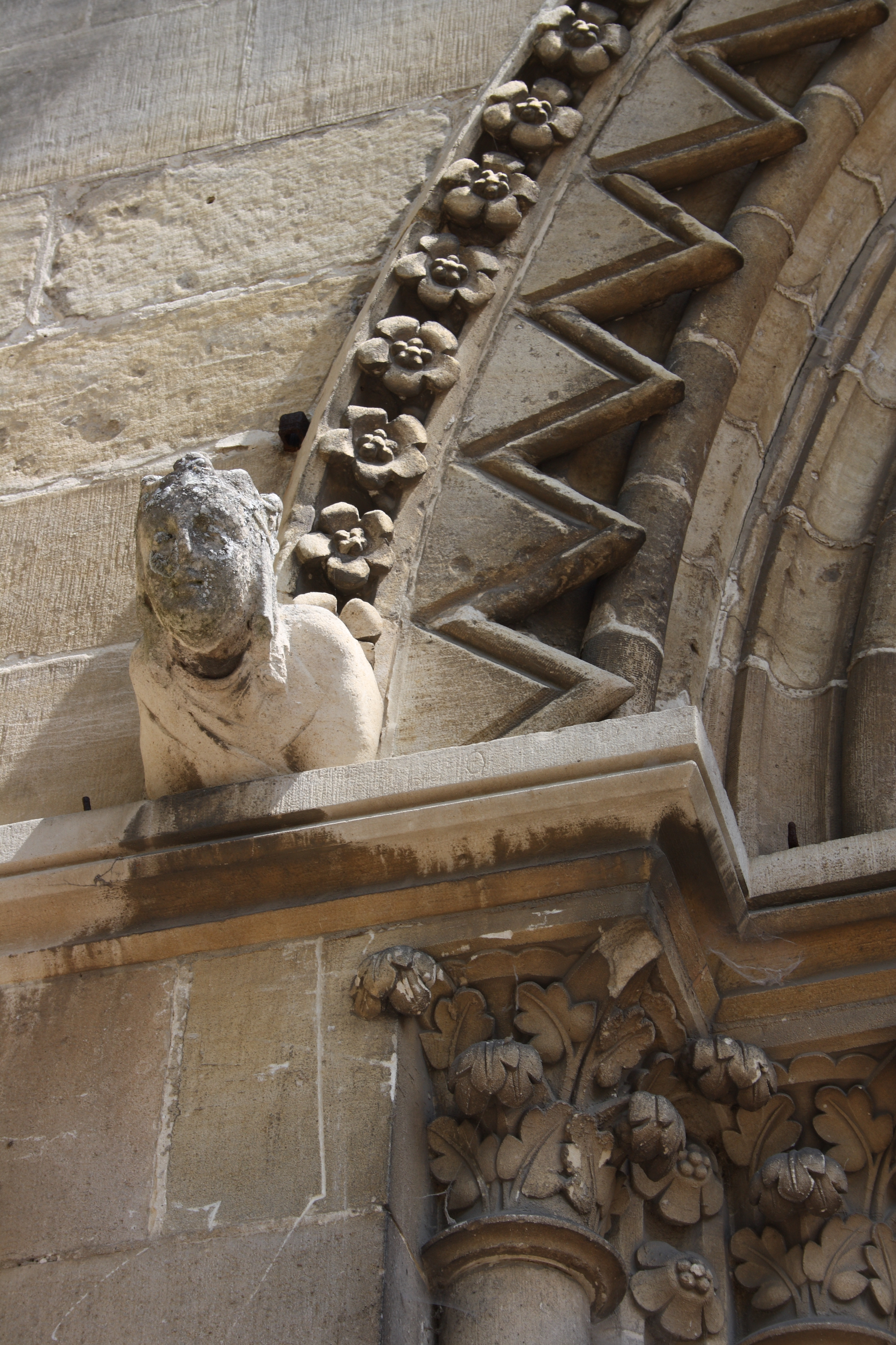 Katholische Kirche Notre-Dame in Taverny, einer Gemeinde im Département Val-d'Oise (Île-de-France), Detail des Portals